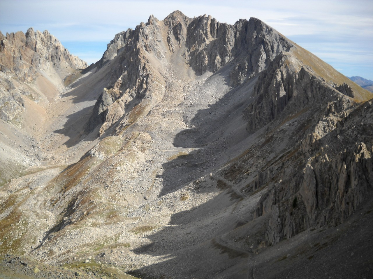 Il versante nord-ovest del monte Oserot visto dal passo Le Croci. È ben visibile la traccia della strada militare che scendeva dal colle Oserot (sulla sinistra) e raggiungeva il passo Le Croci, da dove proseguiva per la caserma del colle Peroni.